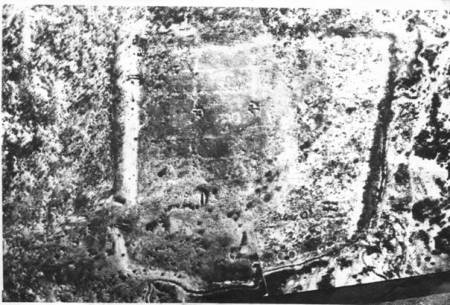 Курганча. Аэрофотоплан.